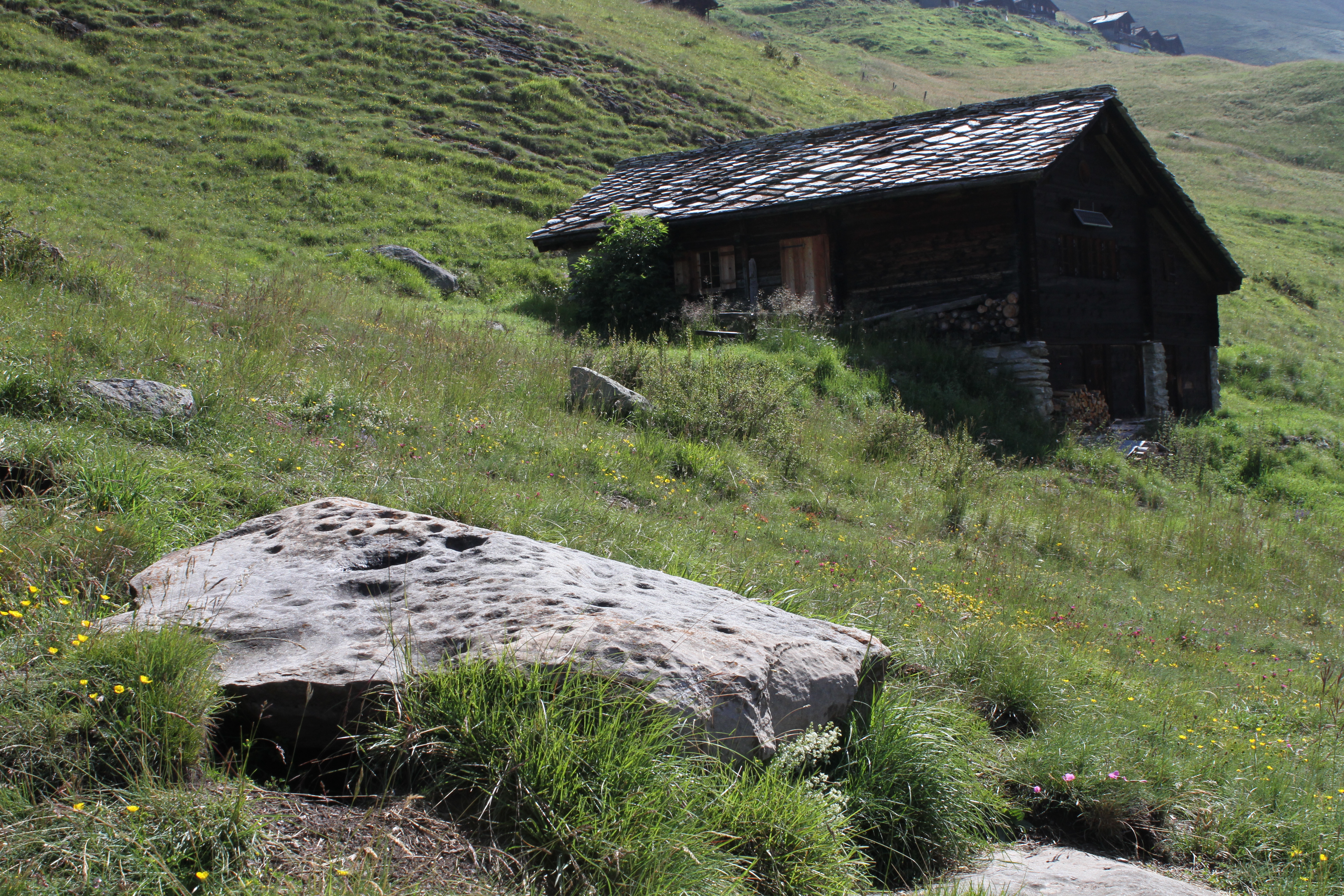 Pierre aux immolés, avec plus de 240 cupules, situées à Cotter, au dessus d'Evolène, dans le Val d'Hérens, dans le canton du Valais, en Suisse.